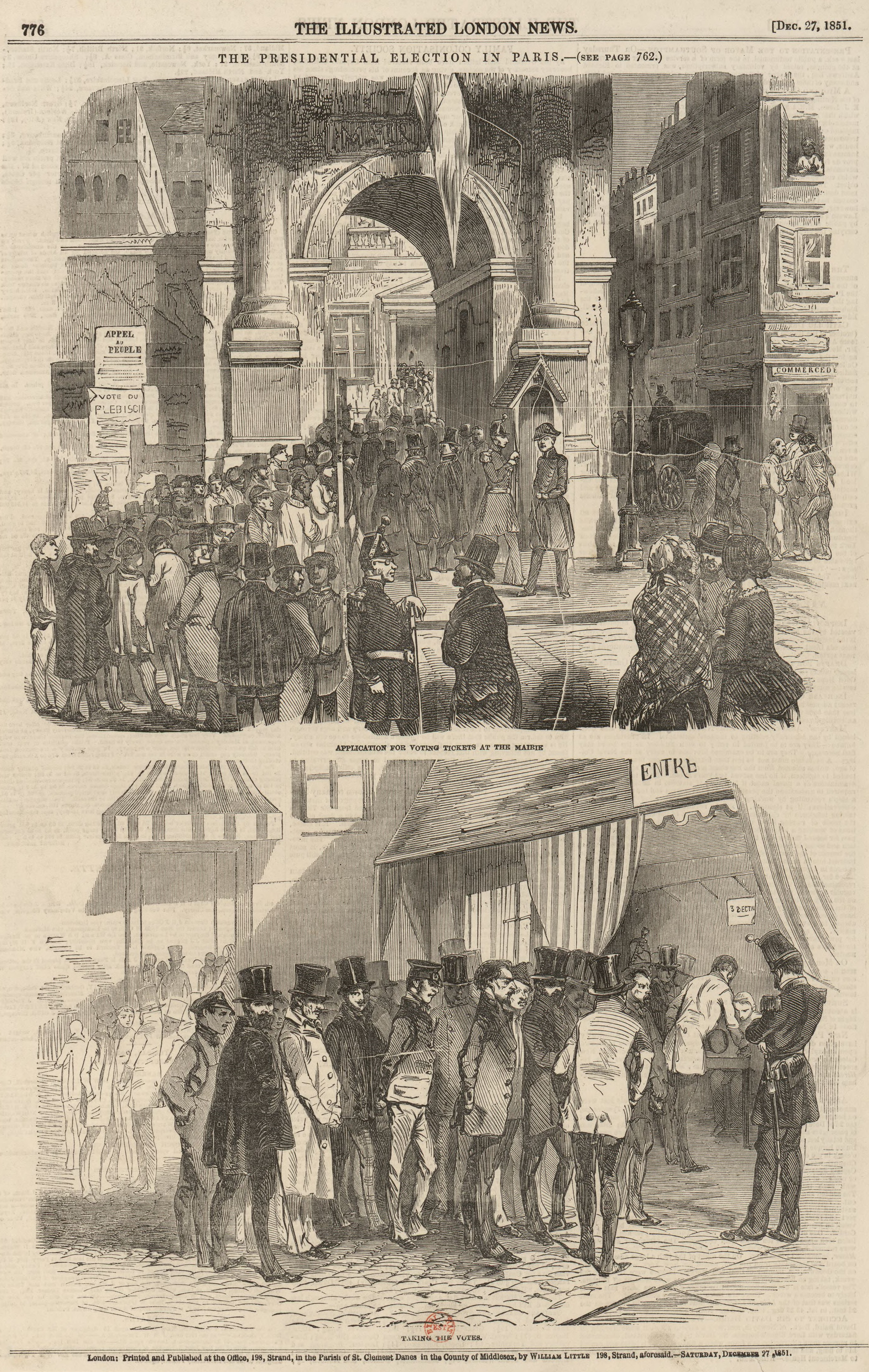 The presidential election in Paris : plébiscite de légitimation du coup d'État de Louis-Napoléon Bonaparte. Illustration publiée dans The Illustrated London News, 27 décembre 1851.